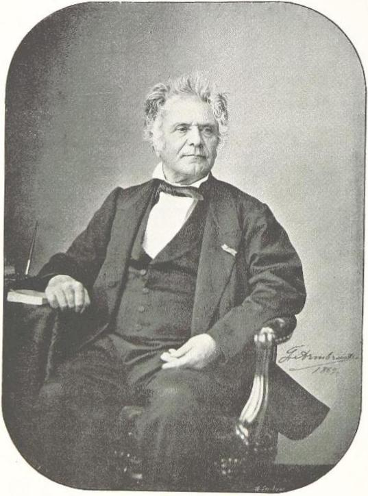 Martial Etienne Mulsant (1797 - 1880) photographié en 1869